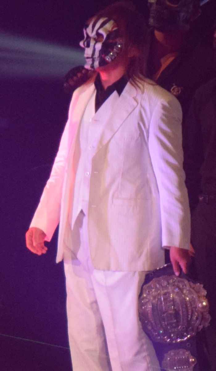 2016年6月19日 大阪城ホール 「DOMINION 6.19 in OSAKA-JO HALL」 内藤哲也